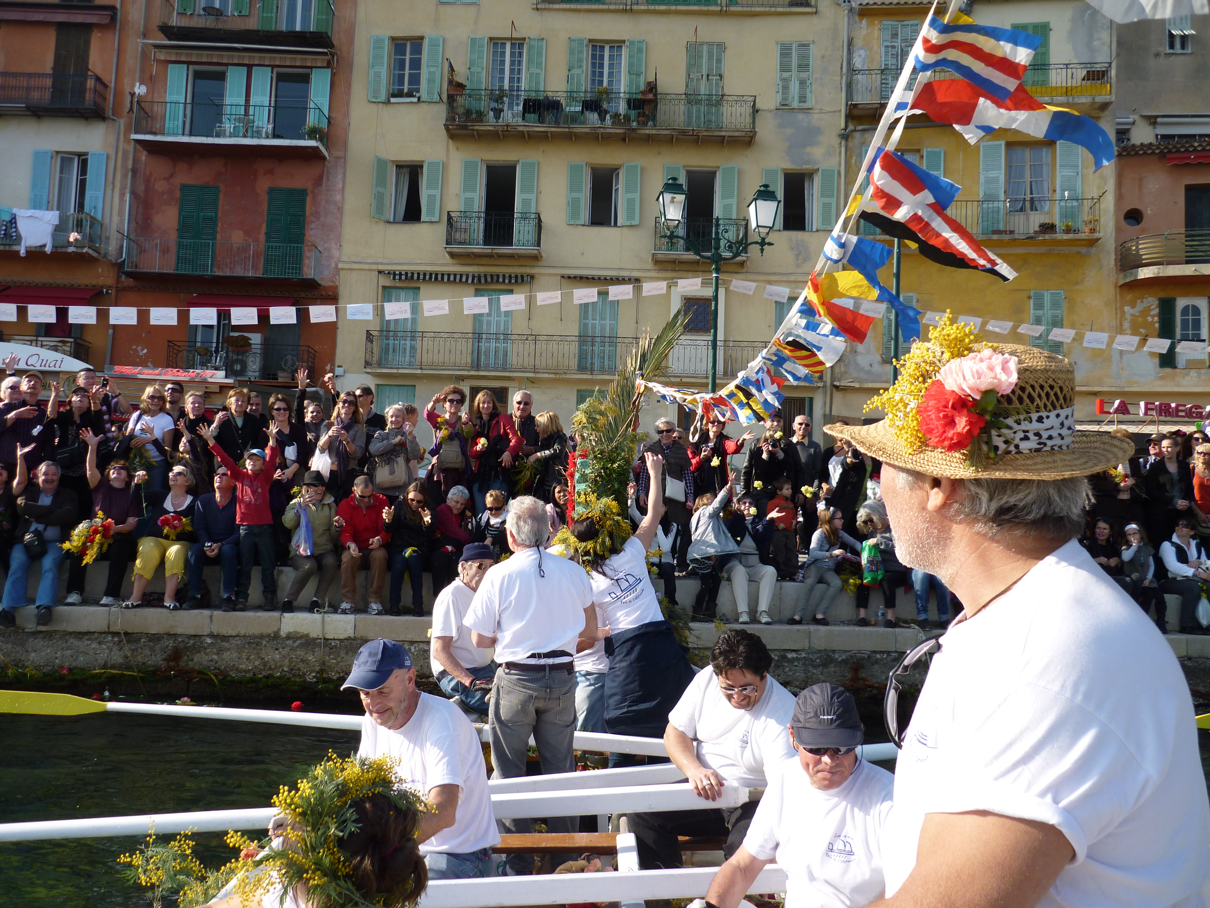 "Combat naval fleuri". Il a lieu chaque année en février dans le port de la Santé de Villefranche-sur-Mer (près de Nice). Les pointus de l'ABPV et la yole, décorés de fleurs, lancent des bouquets aux spectateurs massés sur les quais.